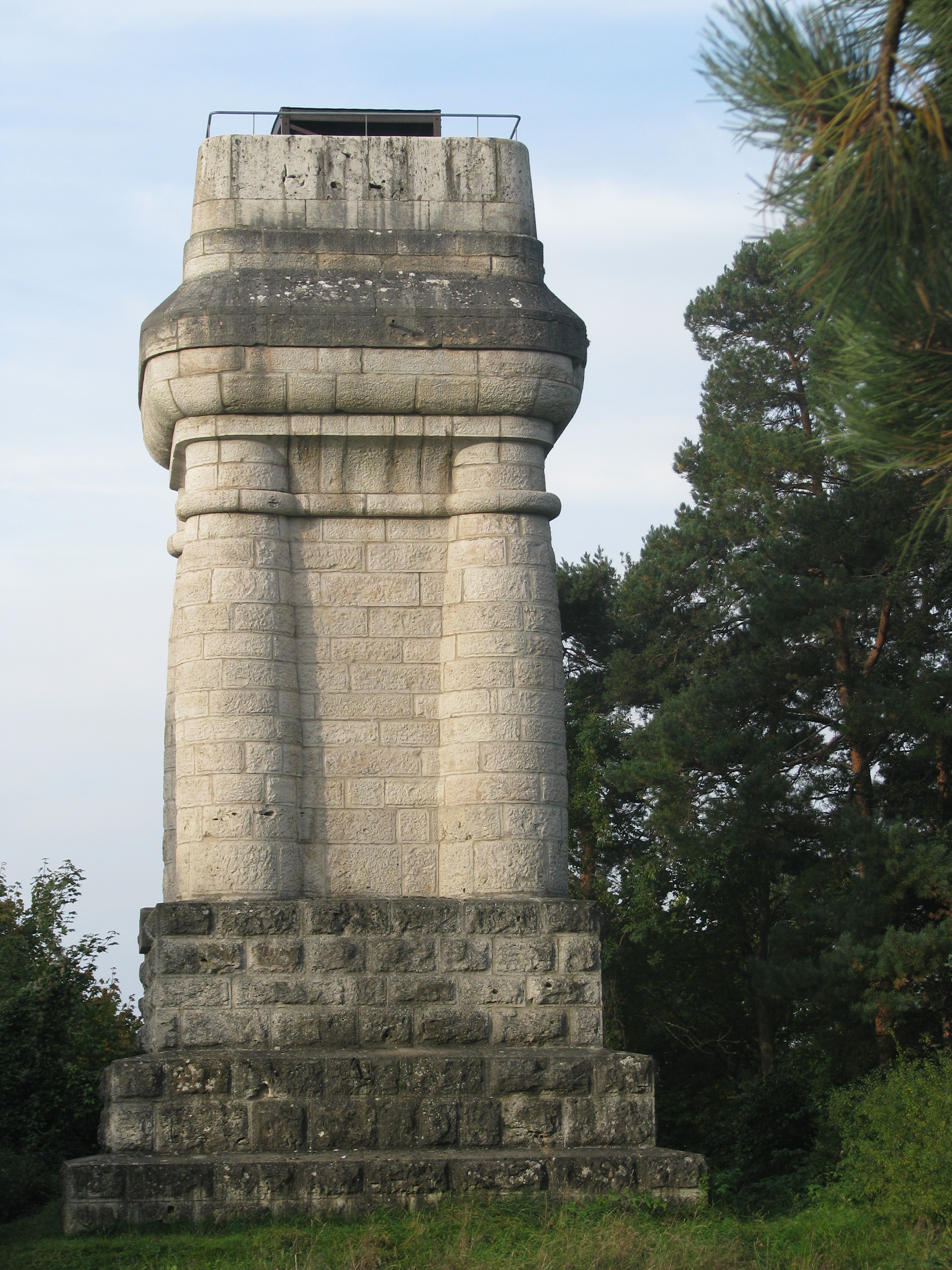 Weiboldshausen (Gemeinde Höttingen im Landkreis Weißenburg-Gunzenhausen), Bismarckturm von 1911